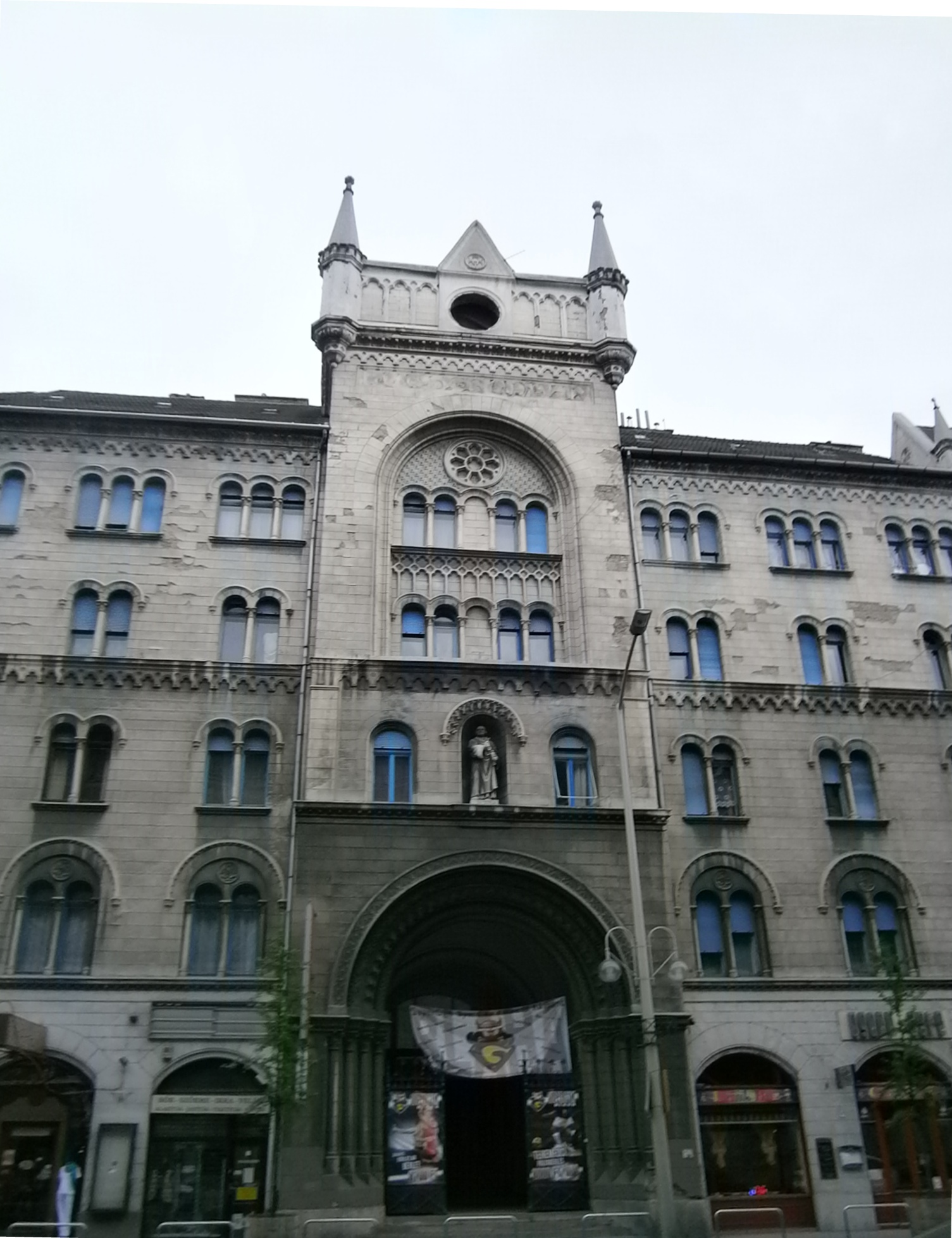 Luther Márton ház, szlovák evangélikus templom. Építés éve: 1856 - 1894. Tervezte: Diescher József és Schweiger Gyula. - Magyarország, Budapest, VIII. kerület, Rákóczi út 57